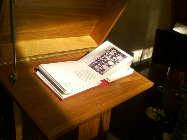 "Lectores" realizado Lucrecia Moras & Federico Fernández Salaffia, este espacio invita, a través de la lectura, a la reflexion en torno a la condición humana en situaciones limite.